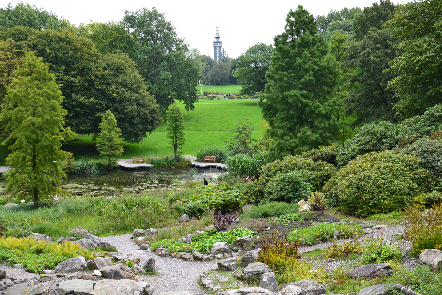 Grugapark in Essen